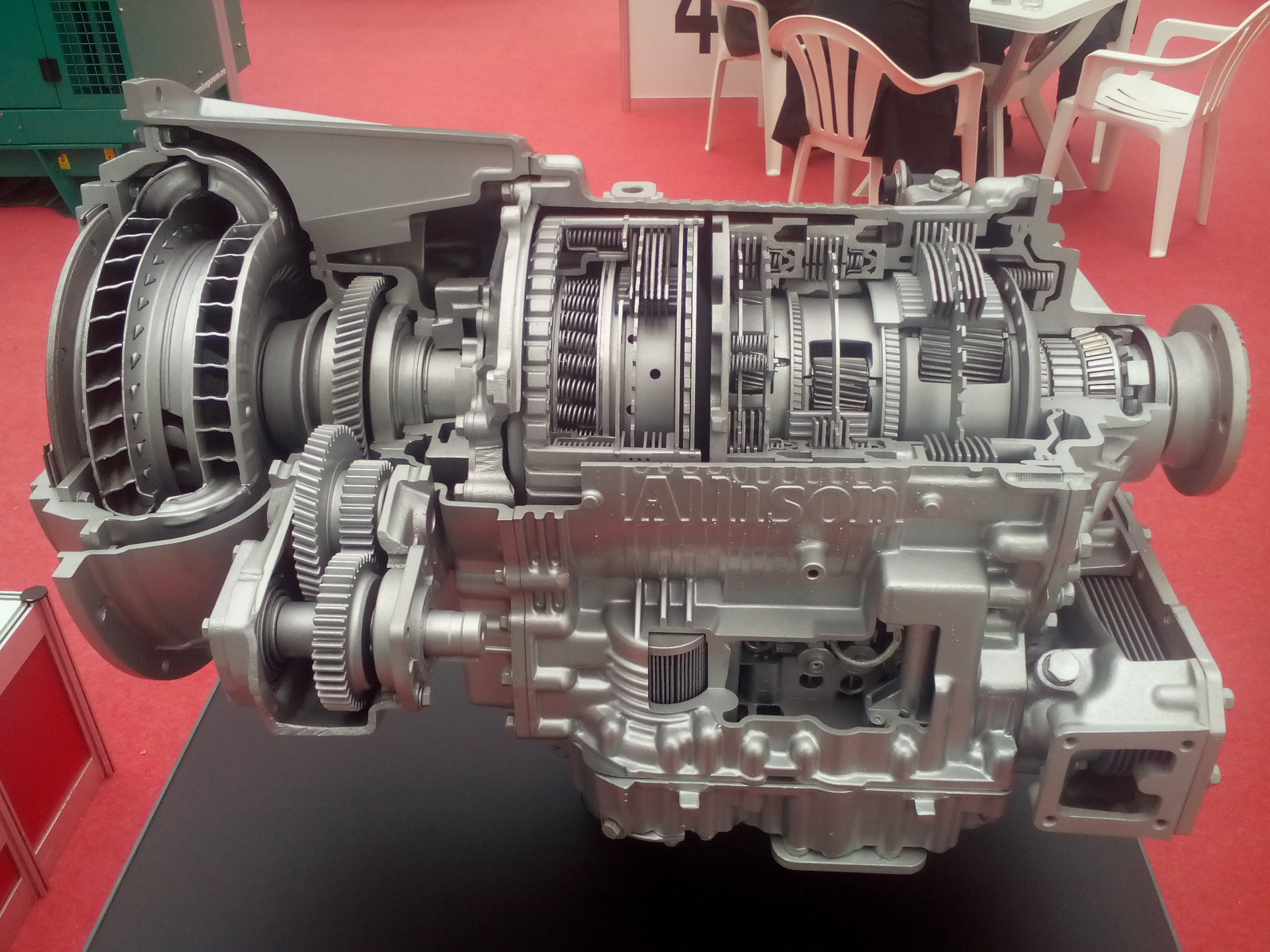 Автоматична скоростна кутия модел Allison MD 3060